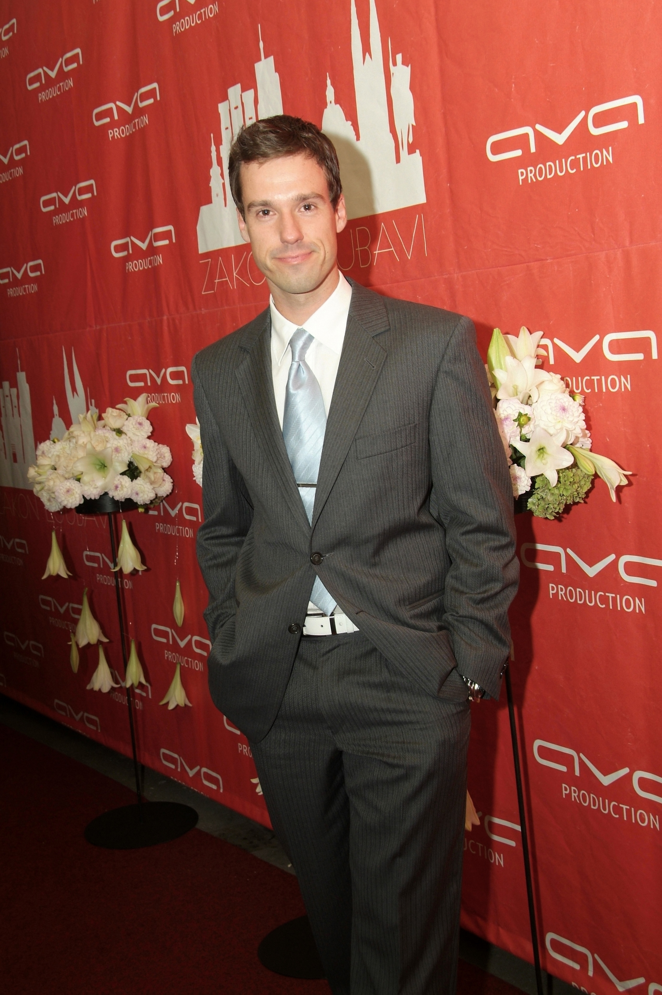 Robert Jozinović at the 2008 Zakon Ljubavi Premier.